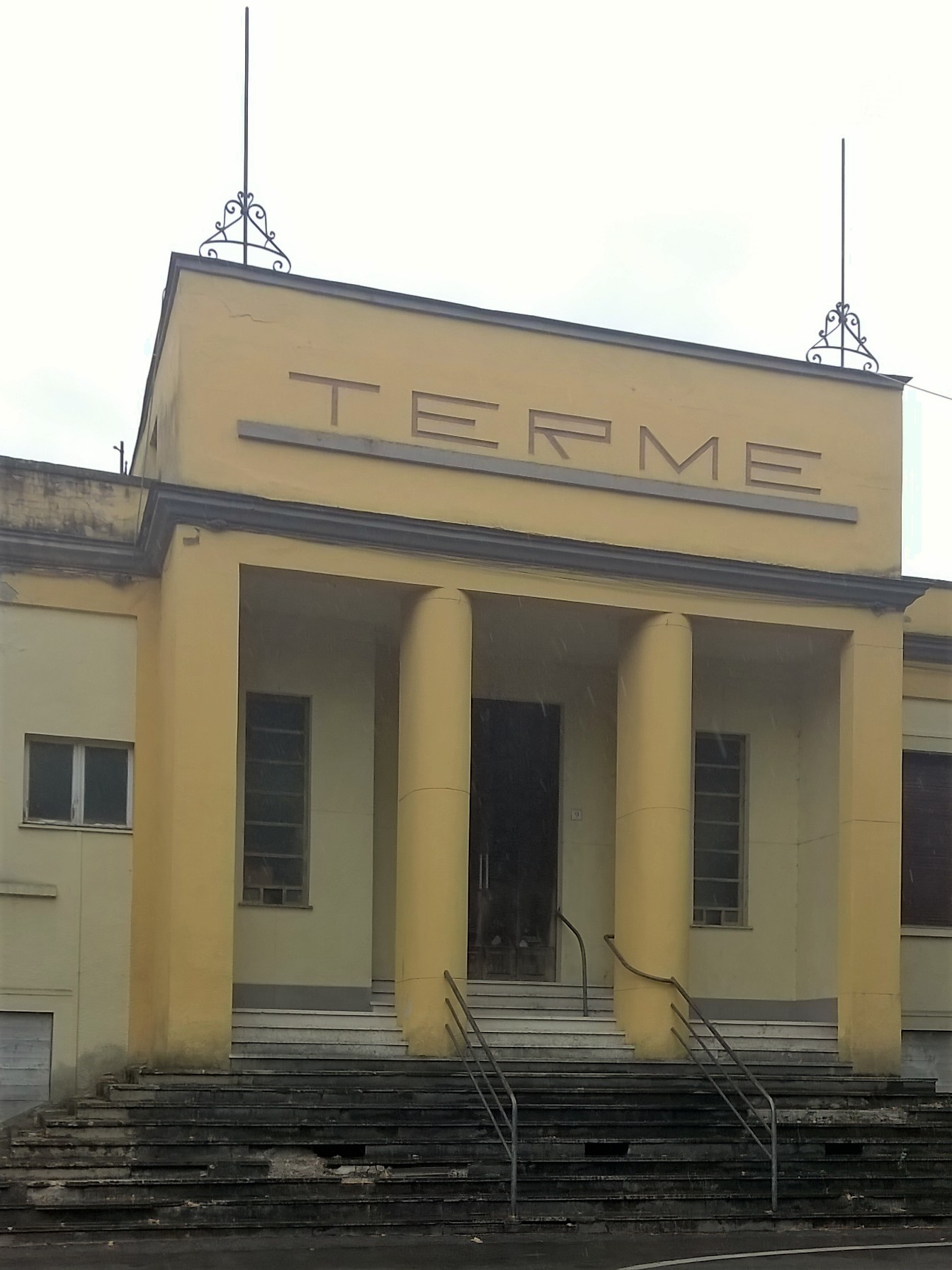 L'edificio ormai dismesso è attualmente inutilizzato.